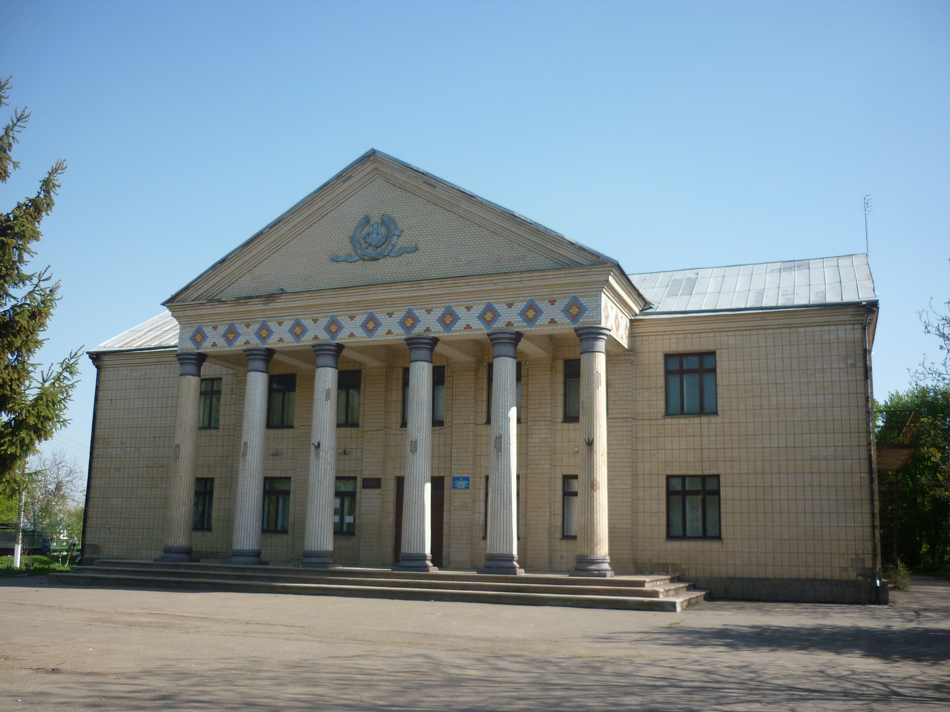 Клуб та музей в селі Краснопілка Гайсинського району